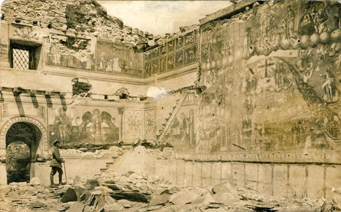 Разрушената църква в Градешница